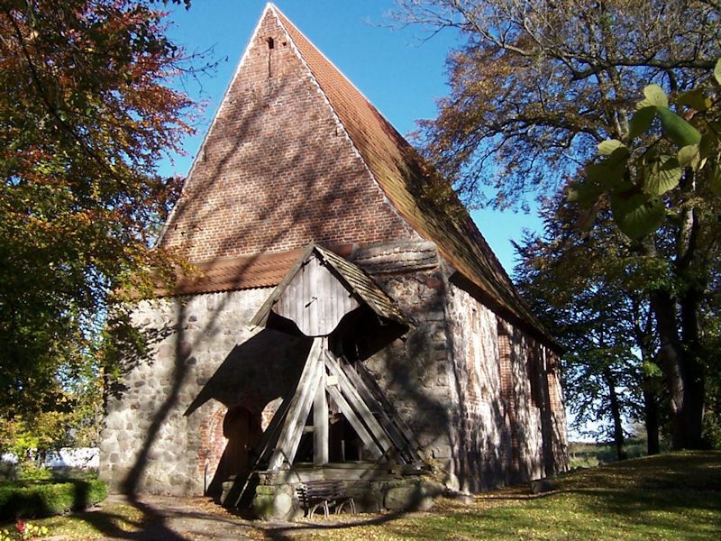 Kirchen in Mecklenburg-Vorpommern